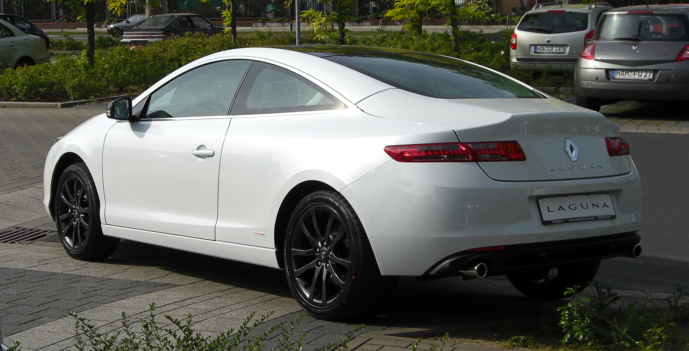 Renault Laguna Coupé Monaco GP dCi 150 (III)